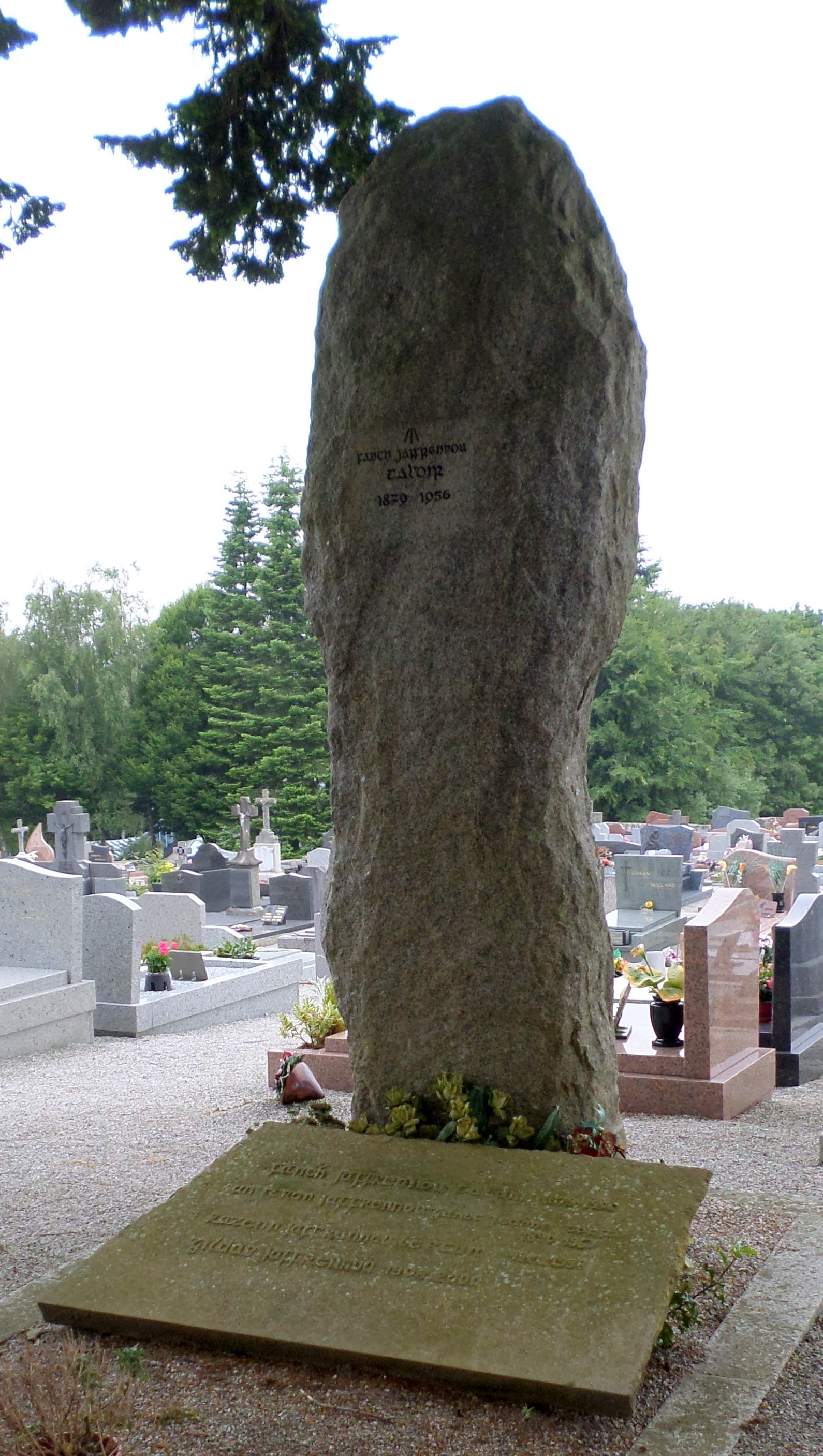 Bez Taldir e bered Karaez